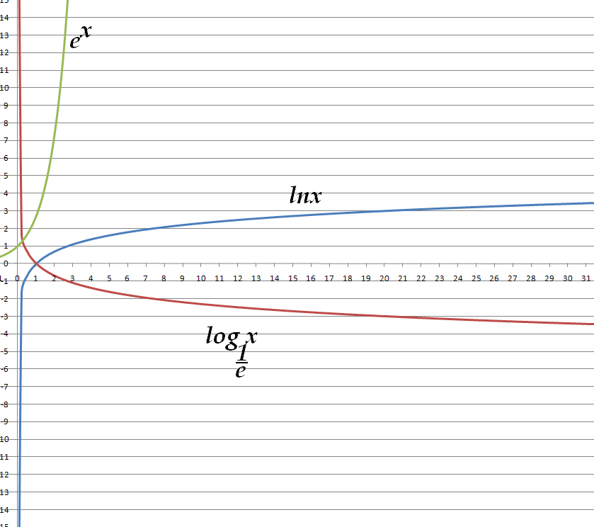 Η εκθετική, νεπέρια και λογαριθμική βάσης 1/e συναρτήσεις.